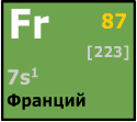 Франций - Fr